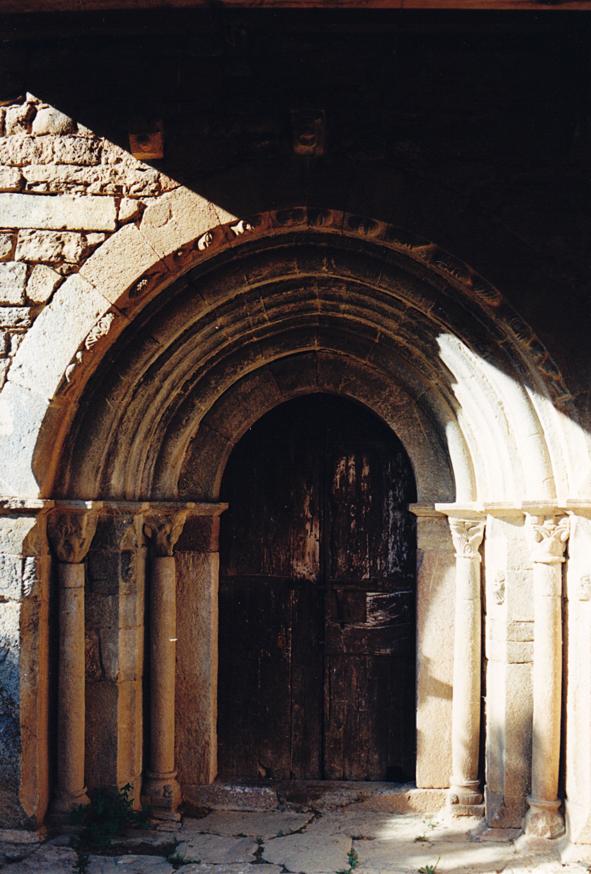 Espagne - Catalogne - Basse-Cerdagne - Isòvol - Église Saint-Pierre d'Olopte